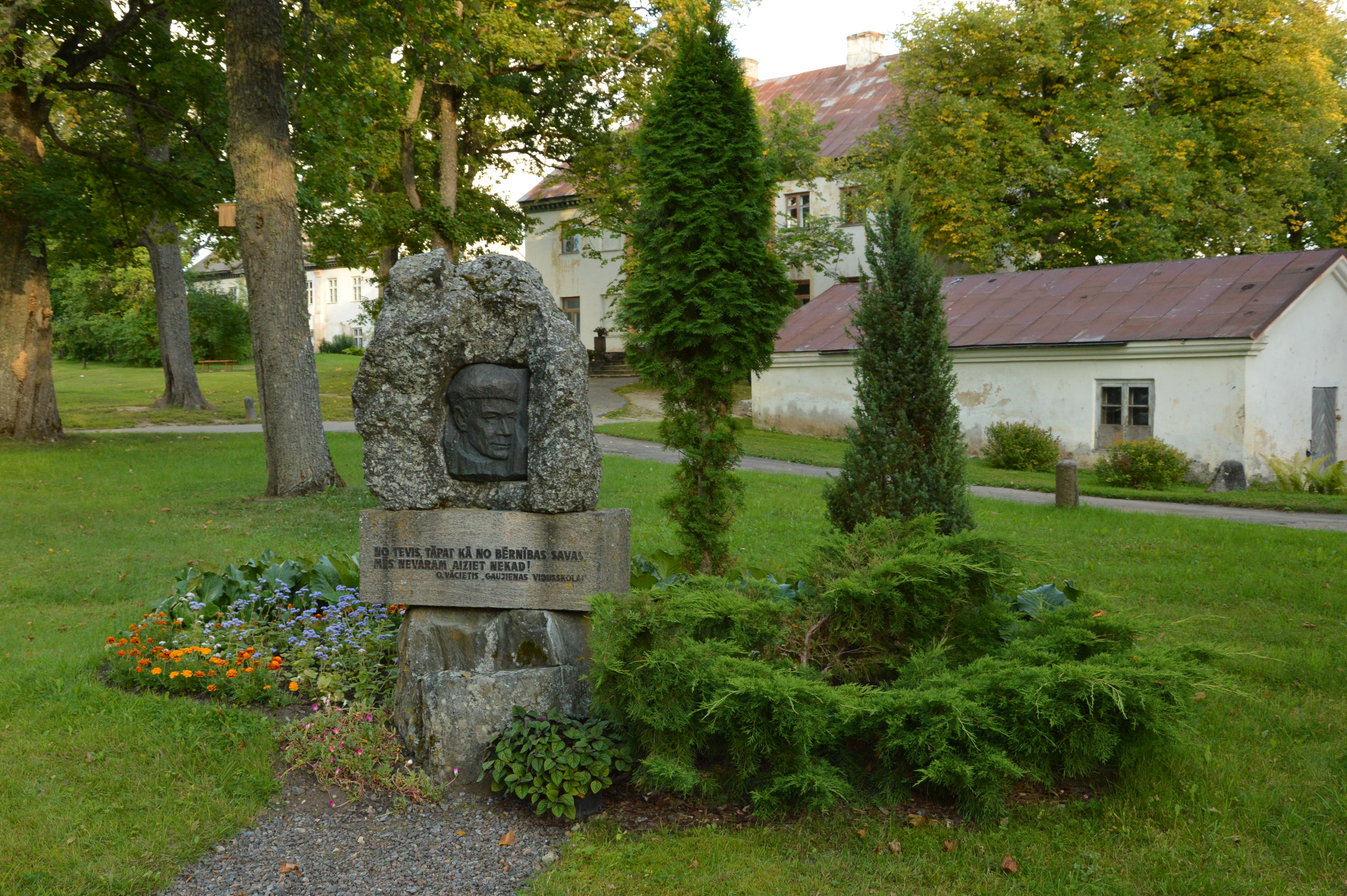 Ojārs Vācietise mälestusmärk Koivaliinas